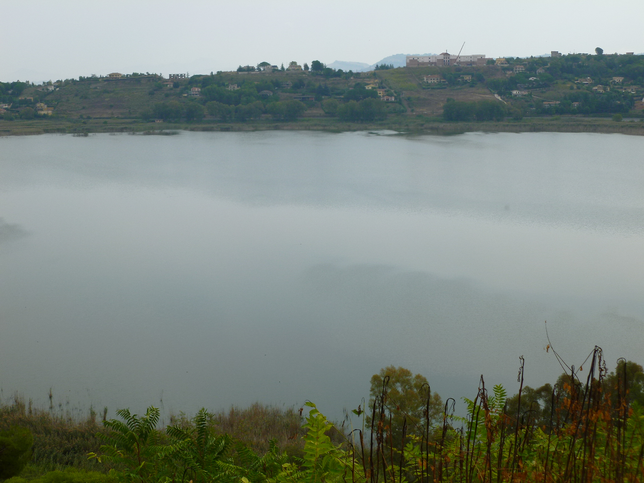 Lago di Pergusa (Enna) Sicily